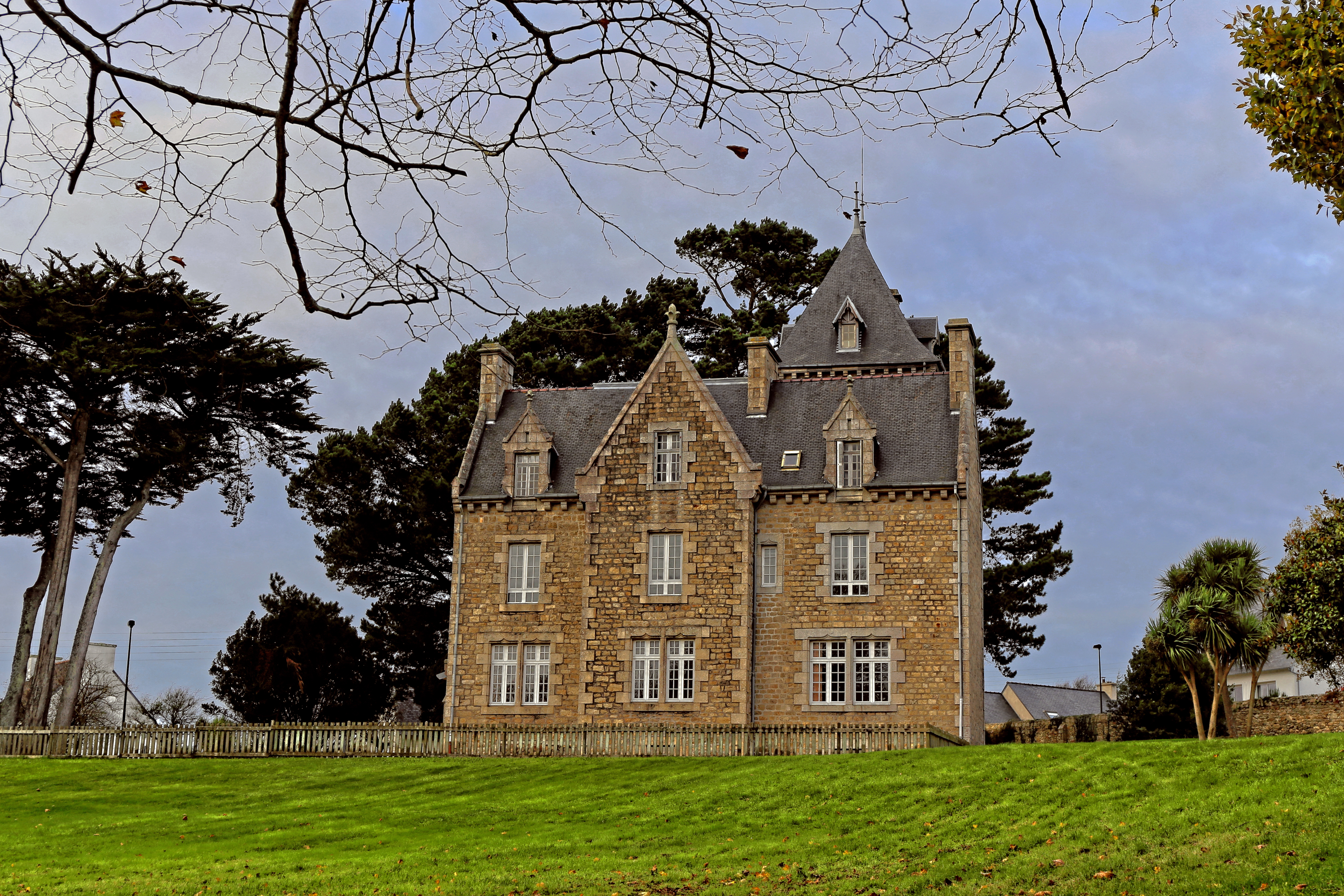 Manoir de Kéraudren dans le parc du Champ de la Rive à Saint-Pol-de-Léon (Finistère, Bretagne).